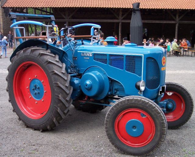 Lanz Ackerluft-Bulldog D4016 Typ HN, Zeche Nachtigall, Muttental, Witten, Deutschland